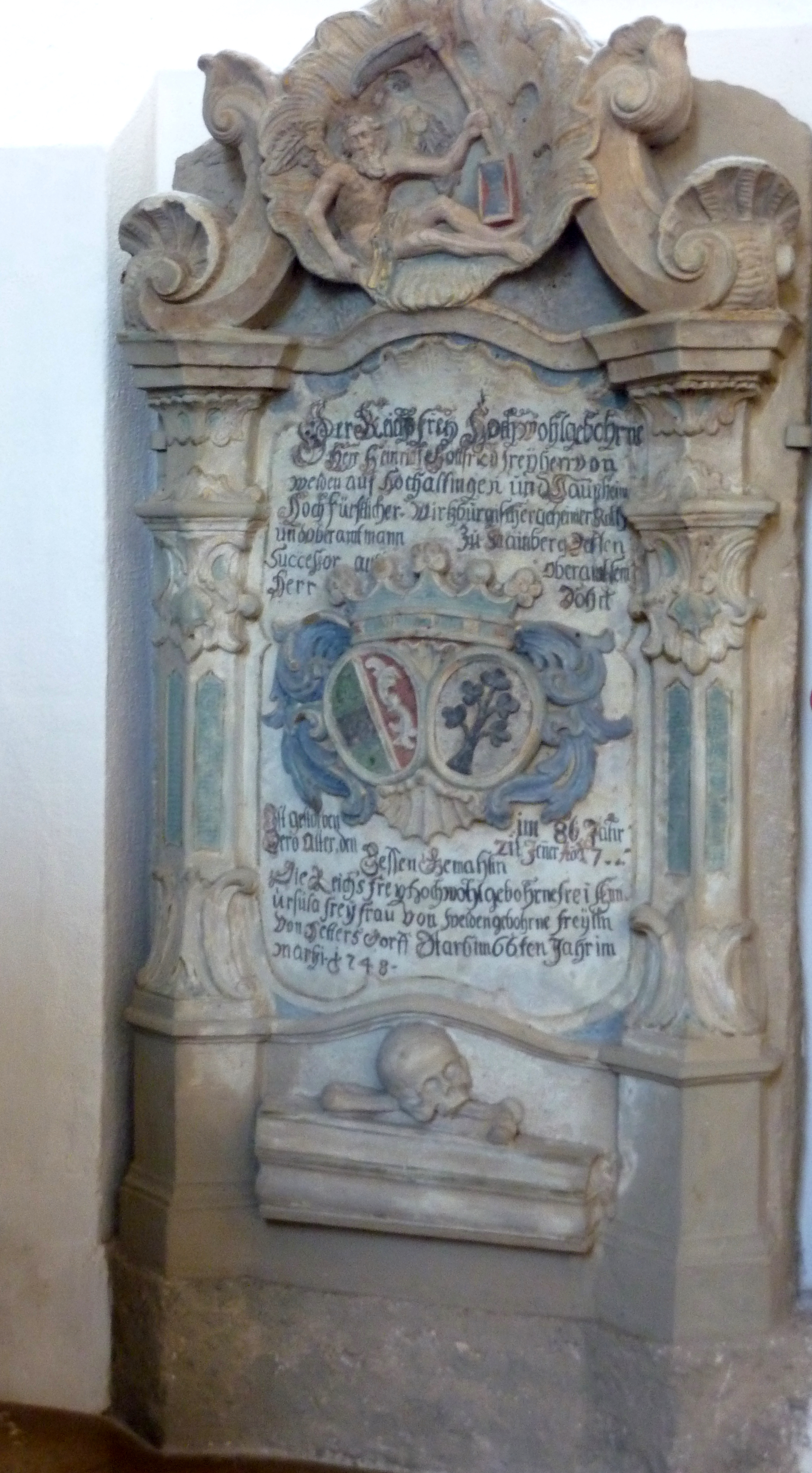 Katholische Pfarrkirche Mariä Himmelfahrt in Hochaltingen, einem Ortsteil von Fremdingen im Landkreis Donau-Ries (Bayern), Grabmal im Chor für Heinrich Gottfried von Welden († 1761) und seiner Gemahlin Anna Ursula († 1748), geb. von Hettersdorf, Sandsteinplatte mit Inschrift und Allianzwappen der Familien von Welden und von Hettersdorf